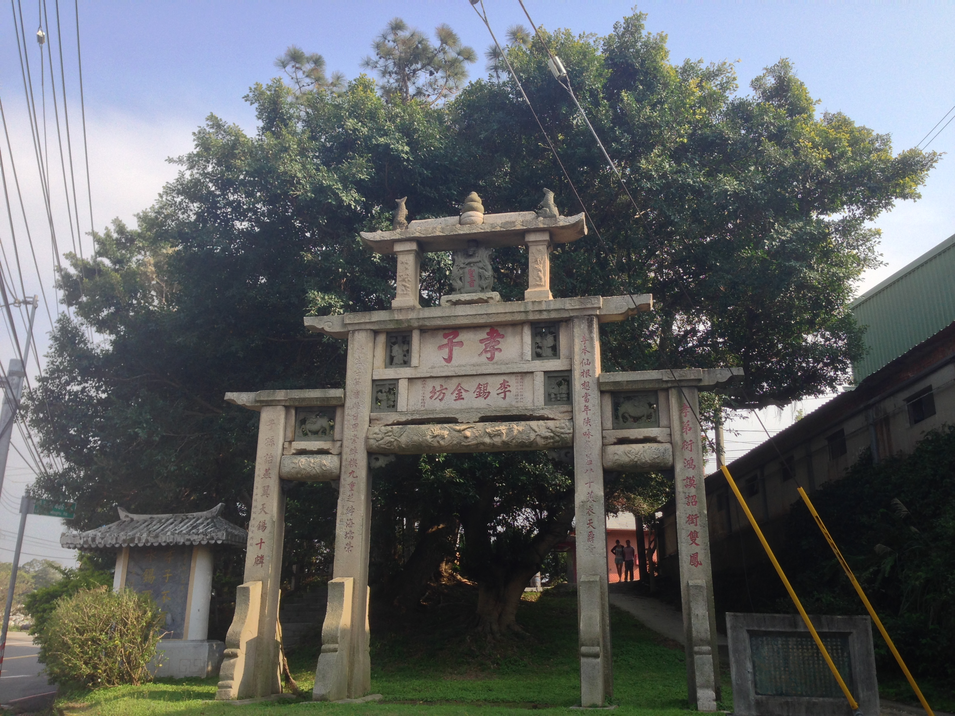 中文（台灣）: 李錫金孝子坊